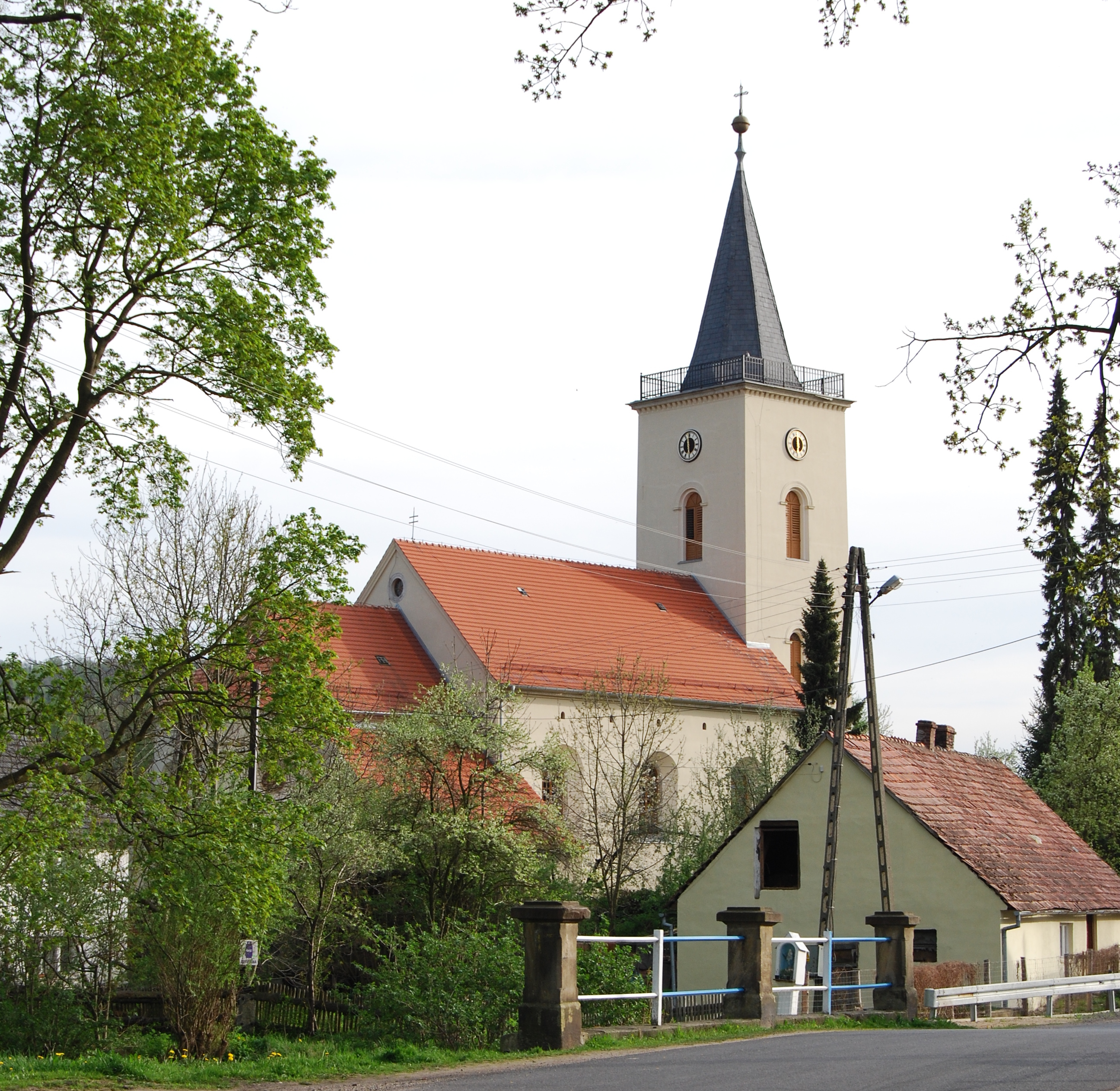 Sokołowiec - kościół parafialny p.w. św. Jadwigi, poł. XIII, XVI, XVIII w. (zabytek nr rejestr. 575 z 18.03.1959)